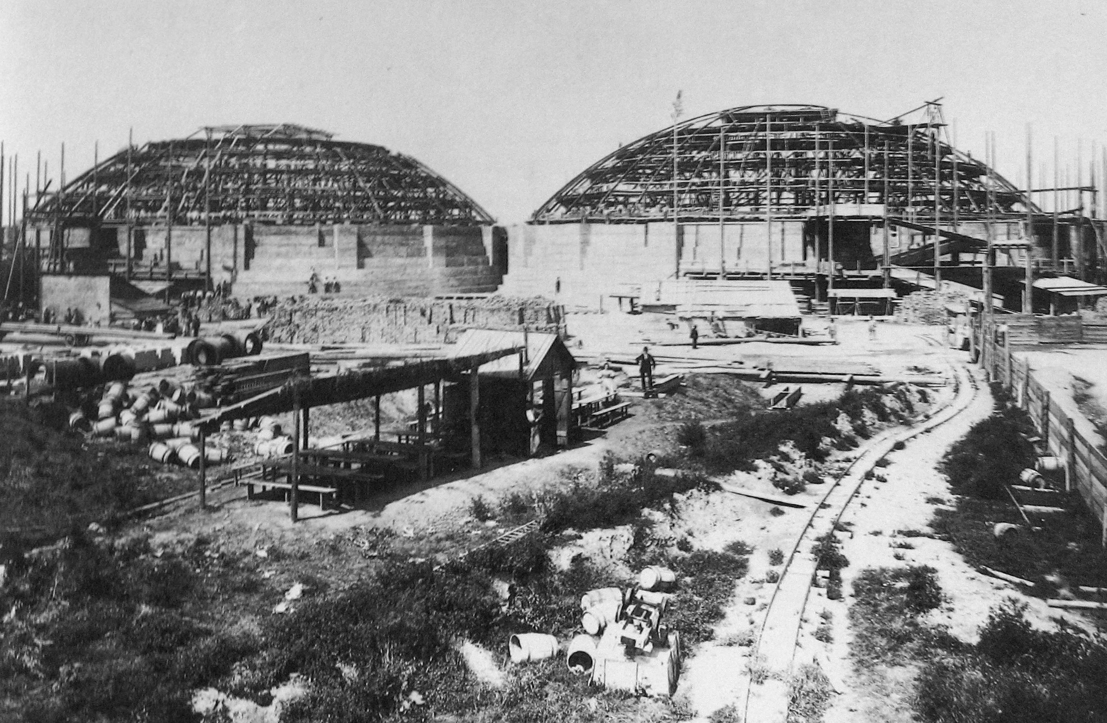 Bau der Simmeringer Gasometer, 1897